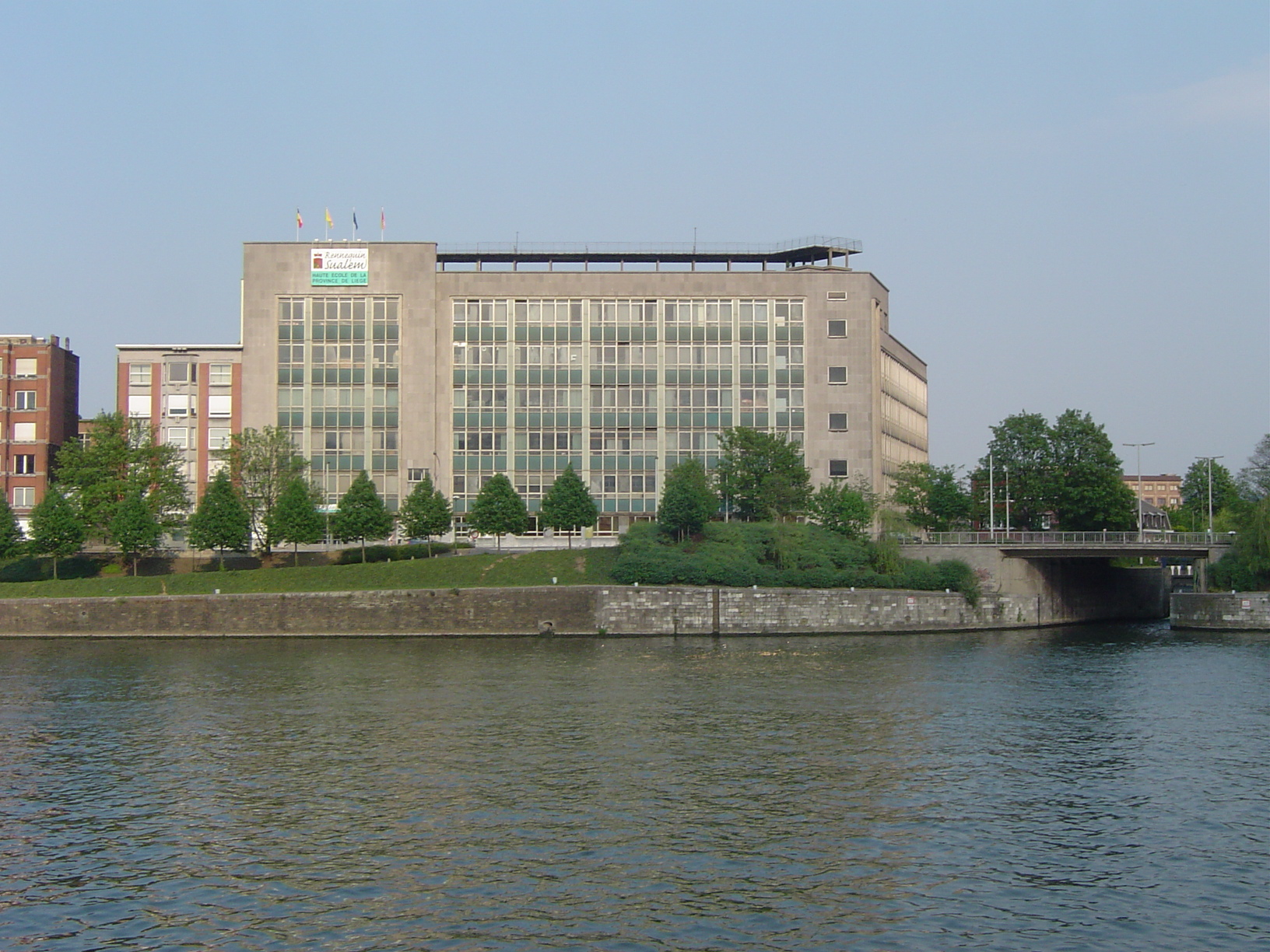 Haute Ecole de la Province de Liège - Rennequin Sualem - Implantation de Liège (Institut Supérieur Industriel Liégeois)